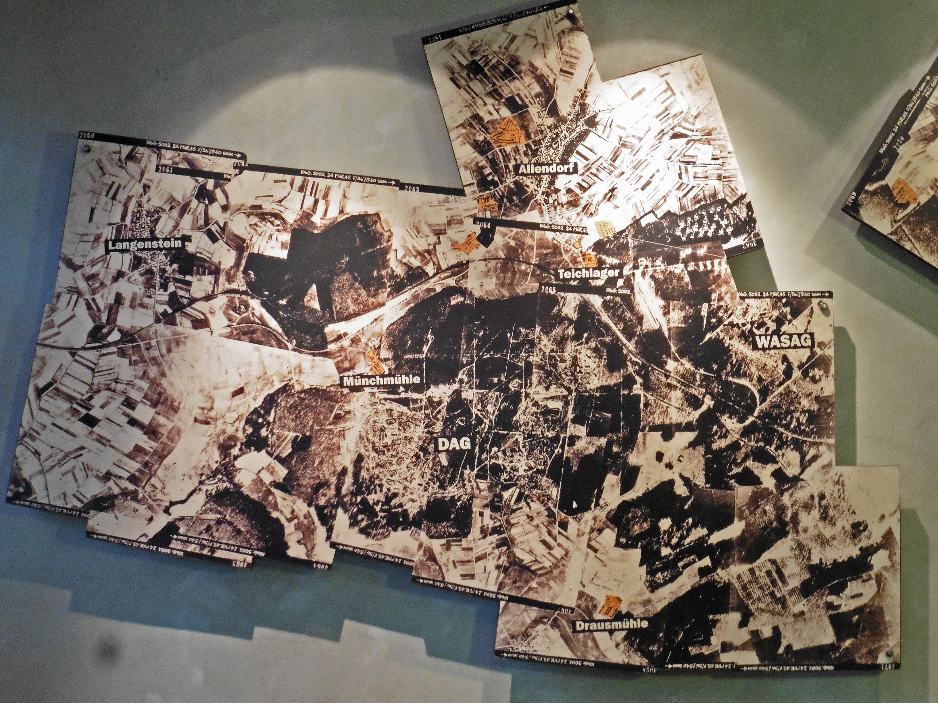 Kollage mehrerer Luftbilder der Sprengstoffwerke Allendorf (DAG) und Herrenwald (WASAG) vom 24. März 1945 im Dokumentations- und Informationszentrum Stadtallendorf (DIZ) in Stadtallendorf.